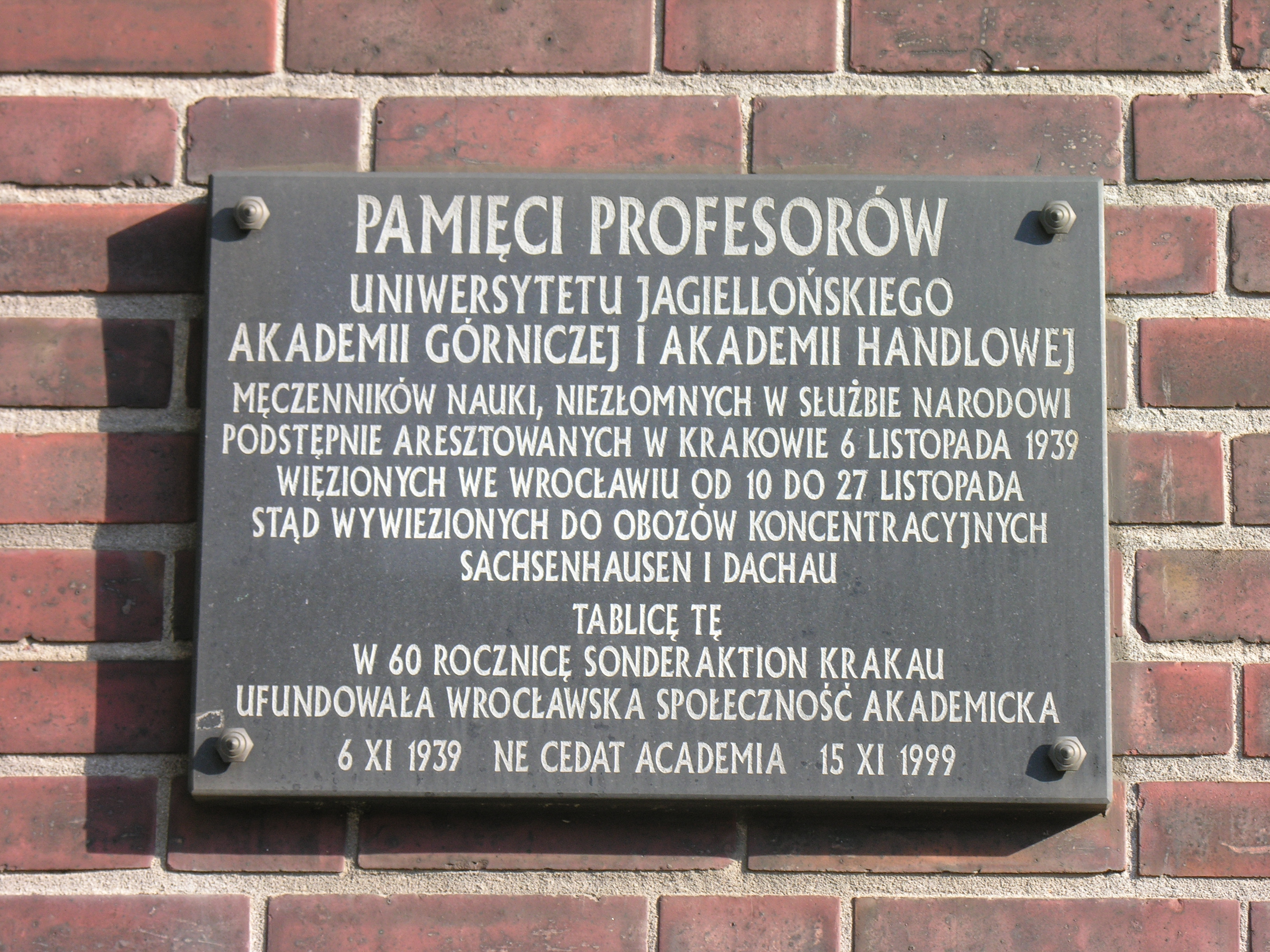 Tablica pamiątkowa Sonderaktion Krakau we Wrocławiu, ul. Sądowa 1